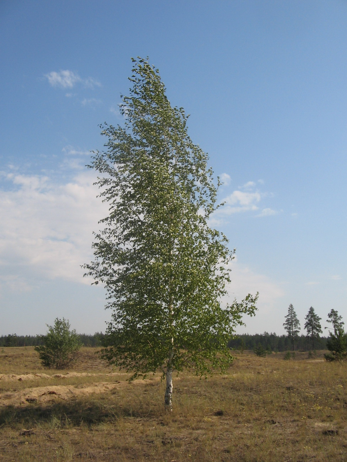 Щурово Щурово (береза)